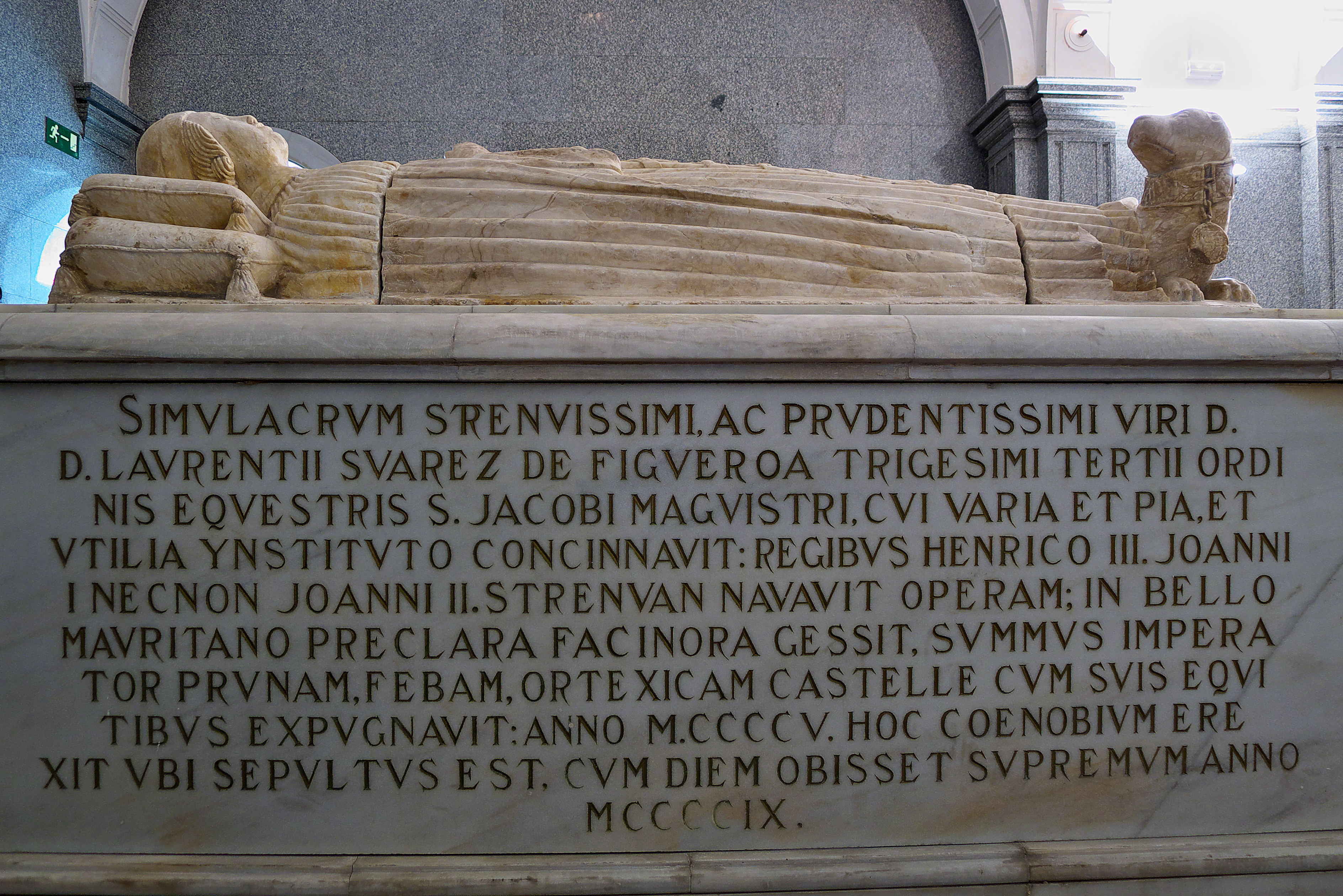 Iglesia de la Anunciación (Sevilla). Maestre de la Orden de Santiago y fundador del convento de Santiago de la Espada. Fallecido en 1409, procede de la capilla mayor del Monasterio de Santiago de la Espada, muy dañado en 1810 por la francesada, labrado en mármol. Entre los primeros sepulcros góticos de Sevilla (1409-1415). Sepulcro atribuido al taller de Ferrand González.